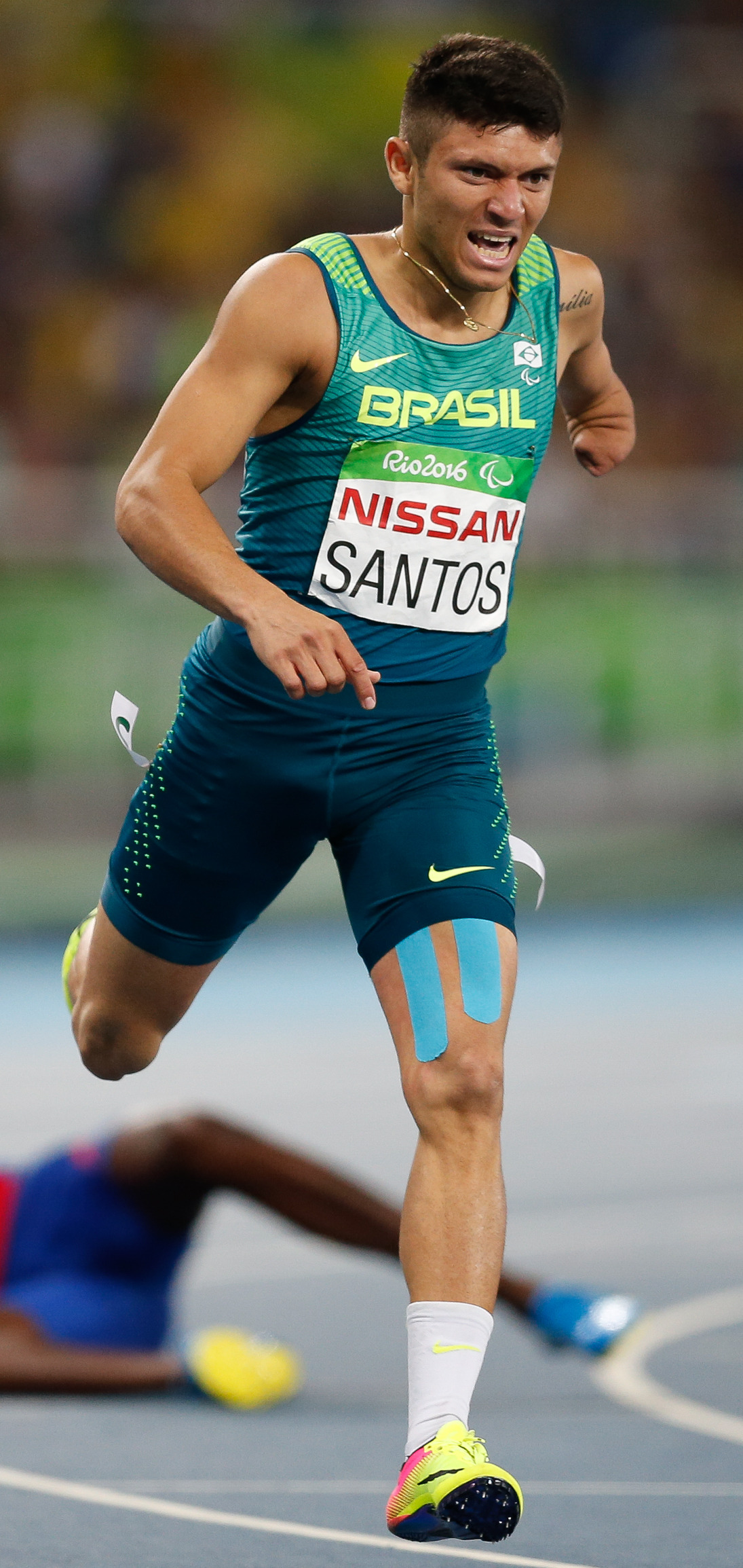 Rio de Janeiro - Petrucio Santos leva prata nos 400m T47 nos Jogos Paralmpicos Rio 2016. (Fernando Frazão/Agência Brasil)